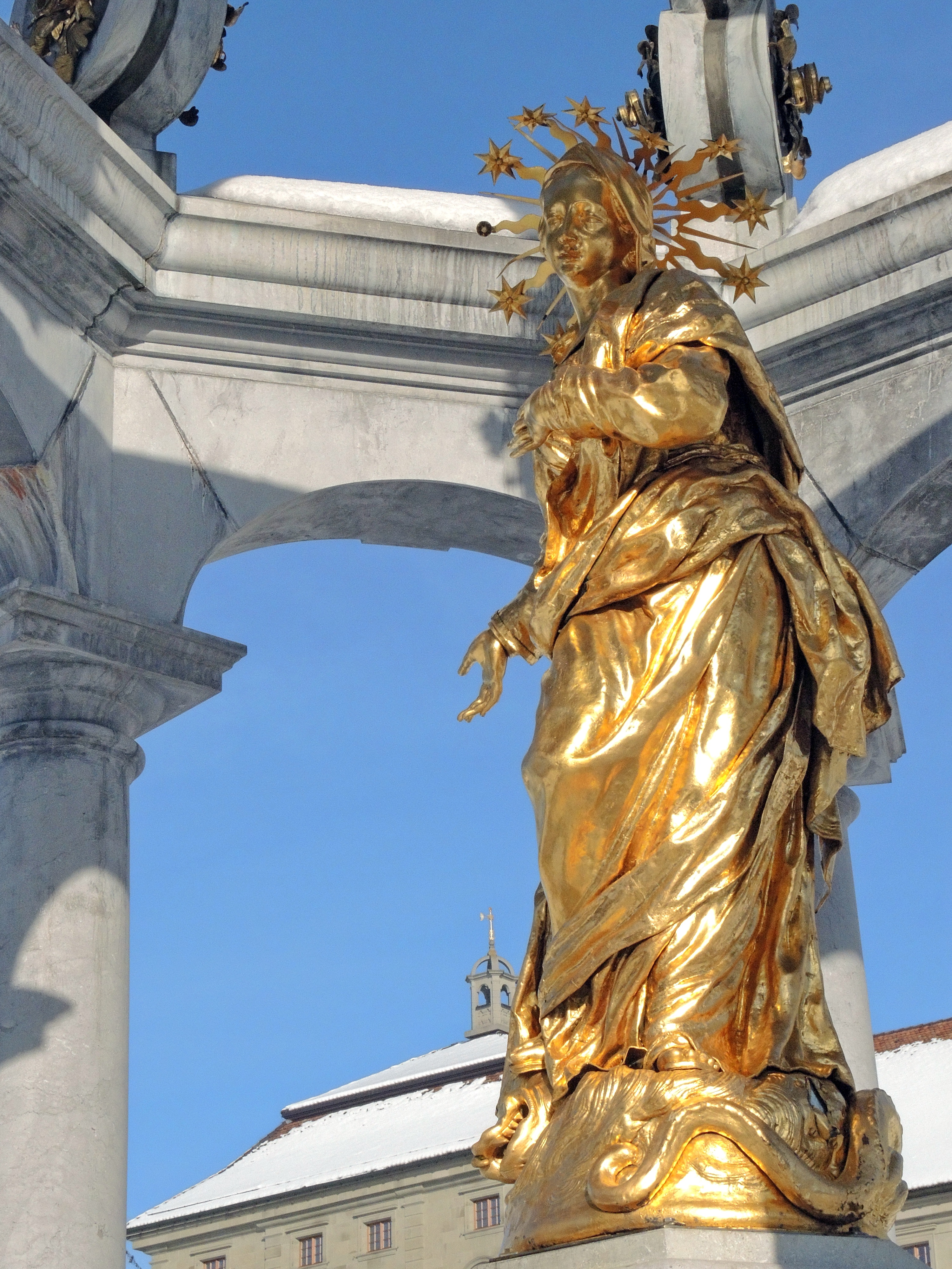 Marienbrunnen,Hauptplatz Kloster Einsiedeln in Einsiedeln (Switzerland)